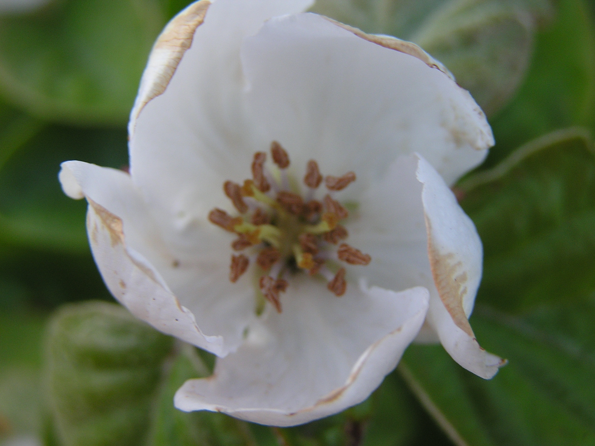 Растение